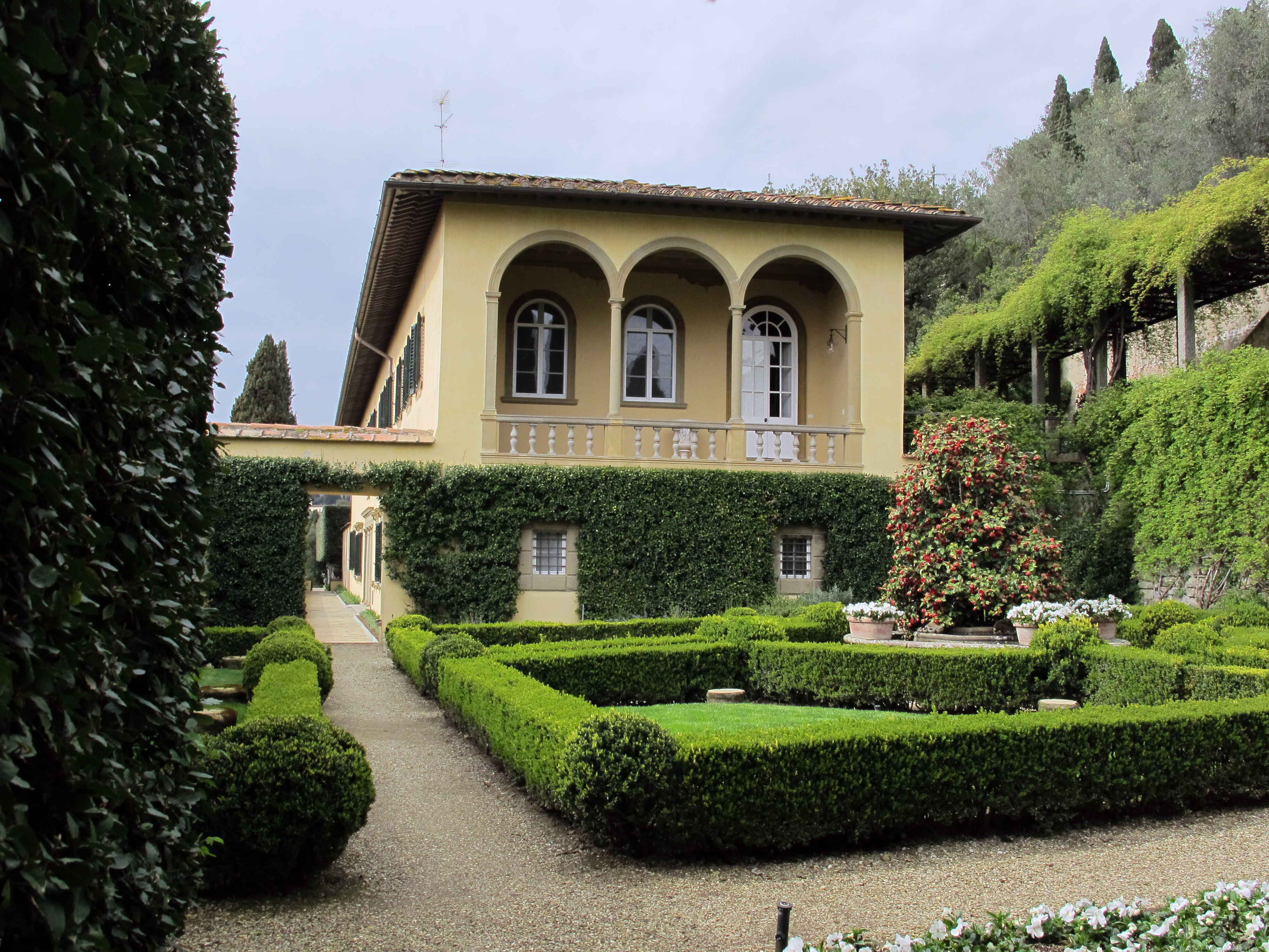 Le balze, giardino d'inverno